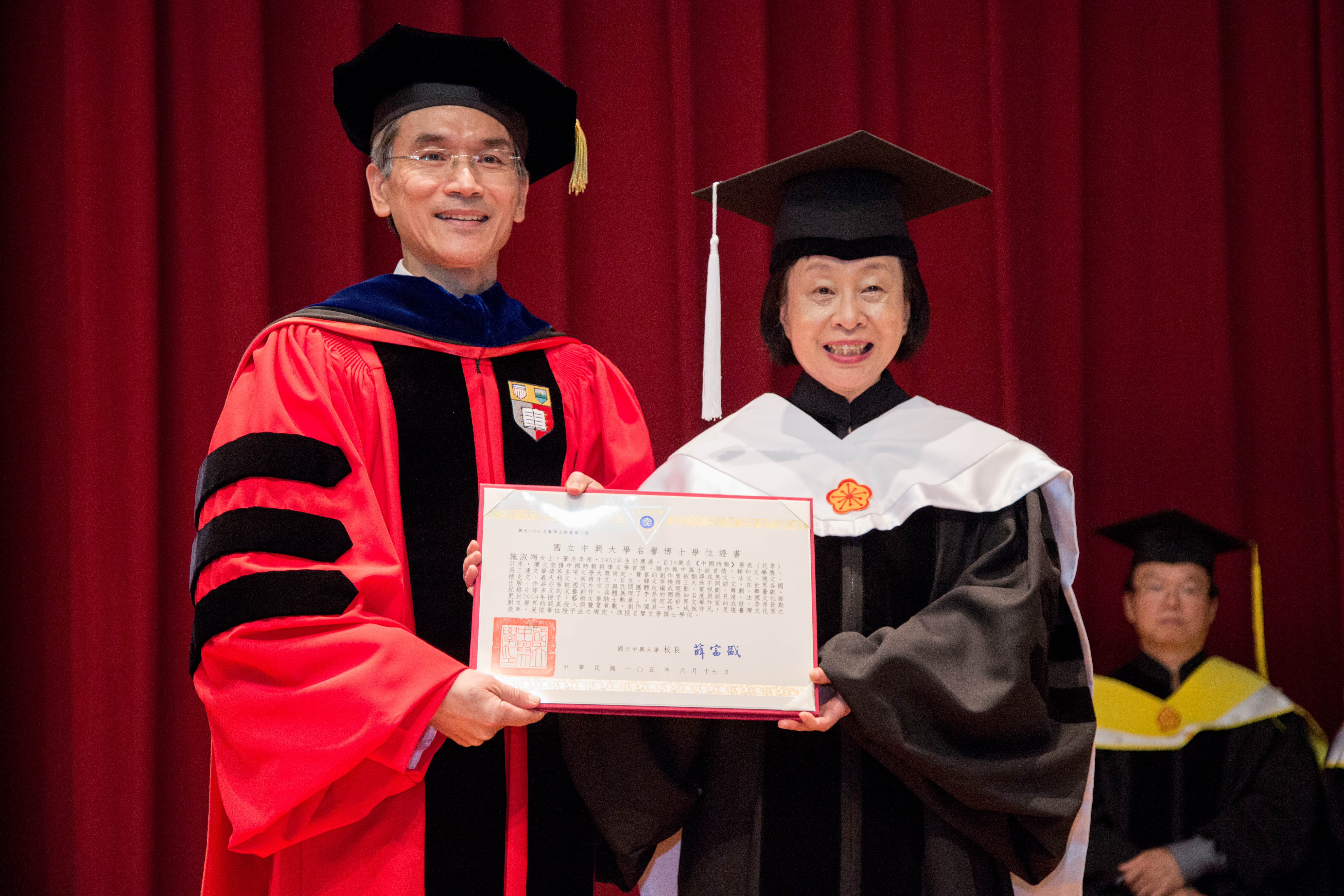 中文（台灣）: 作家李昂獲頒國立中興大學名譽文學博士學位。